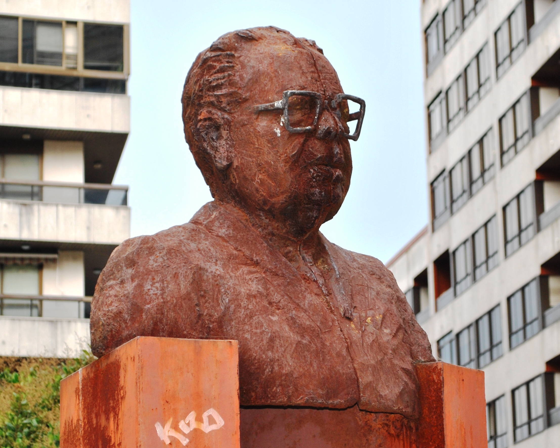 Busto de Francisco Fernández del Riego en Vigo, obra do artista Álvaro de la Vega.